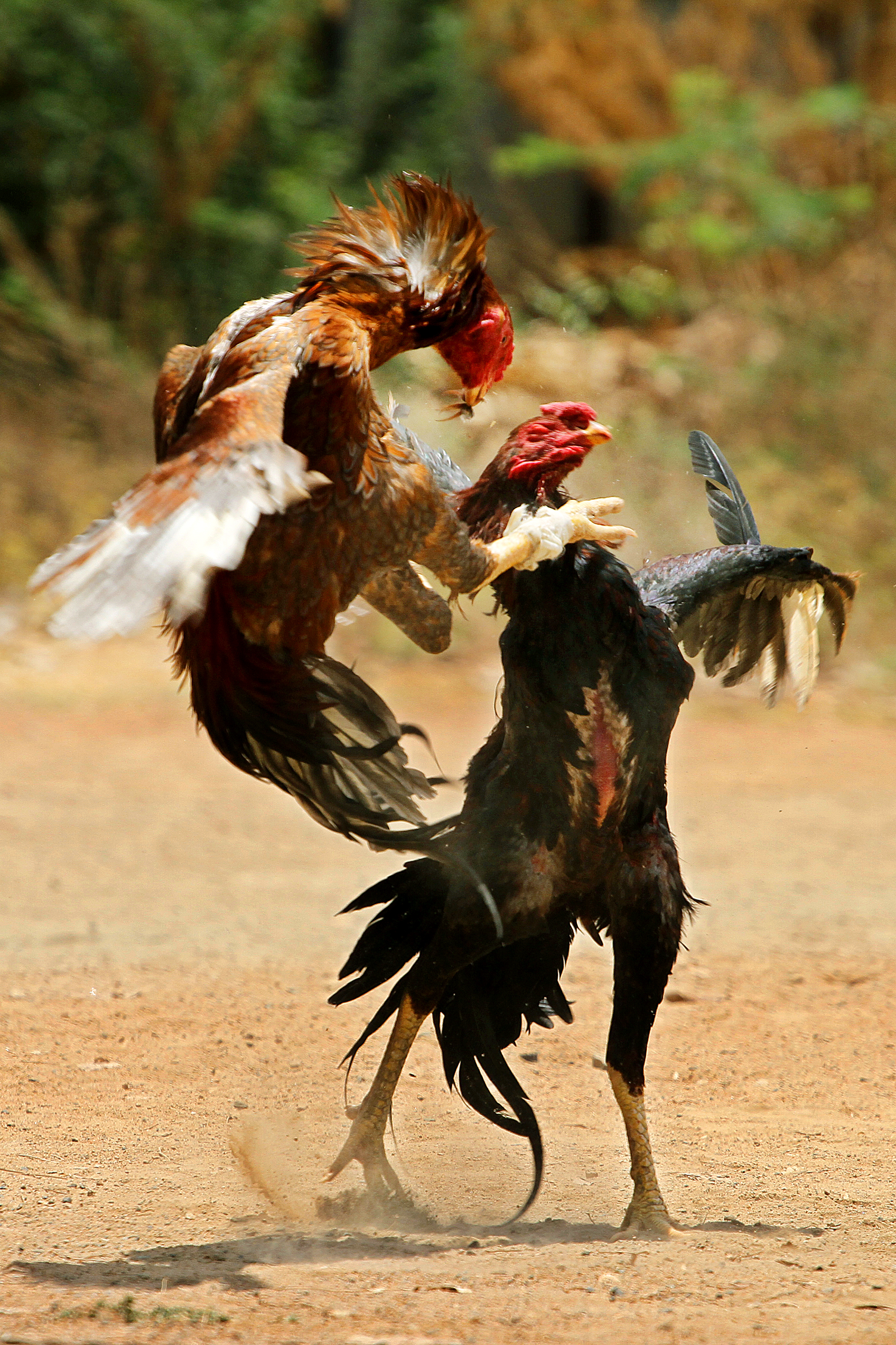 சண்டைக்கோழி